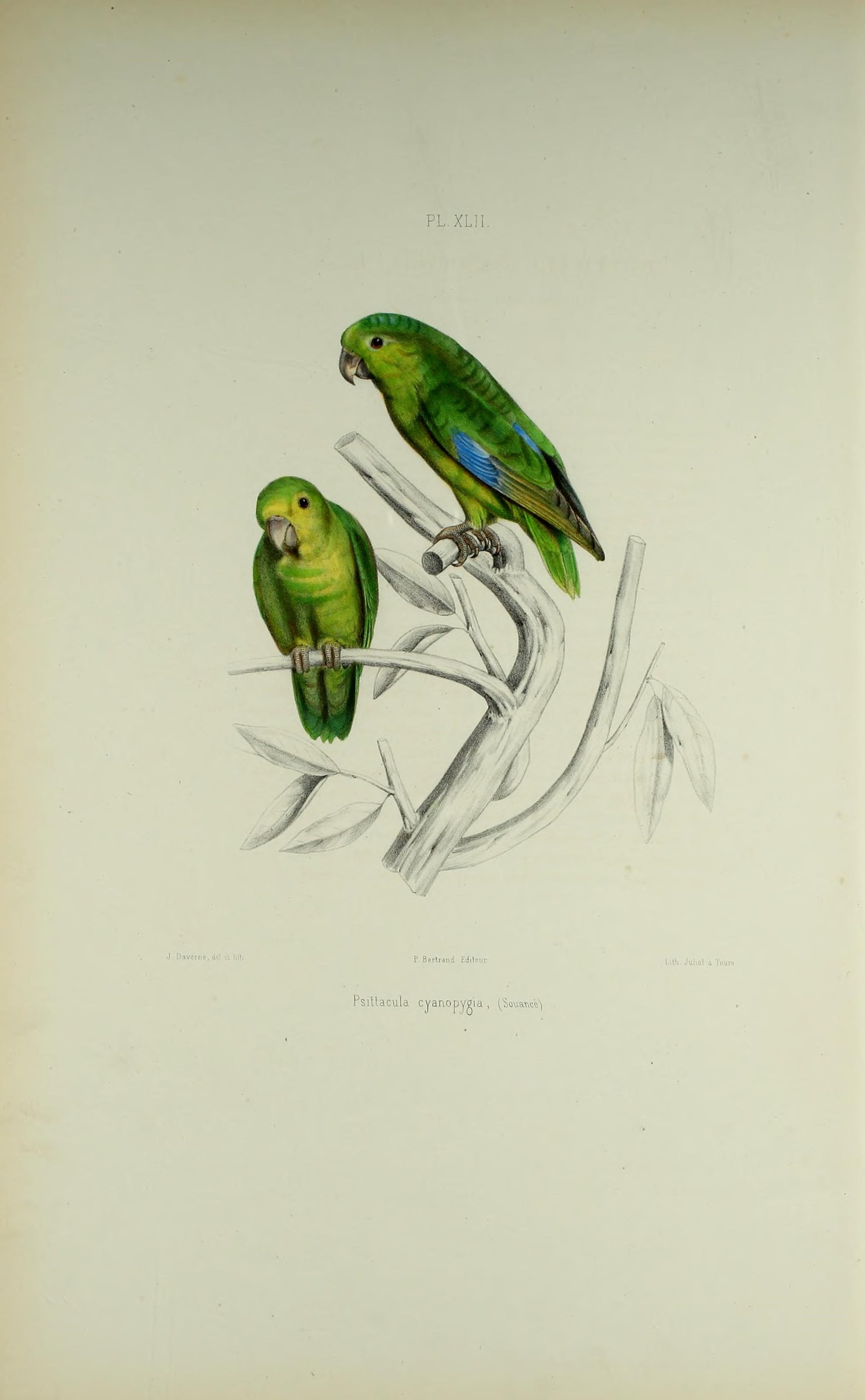 PL.XLIl